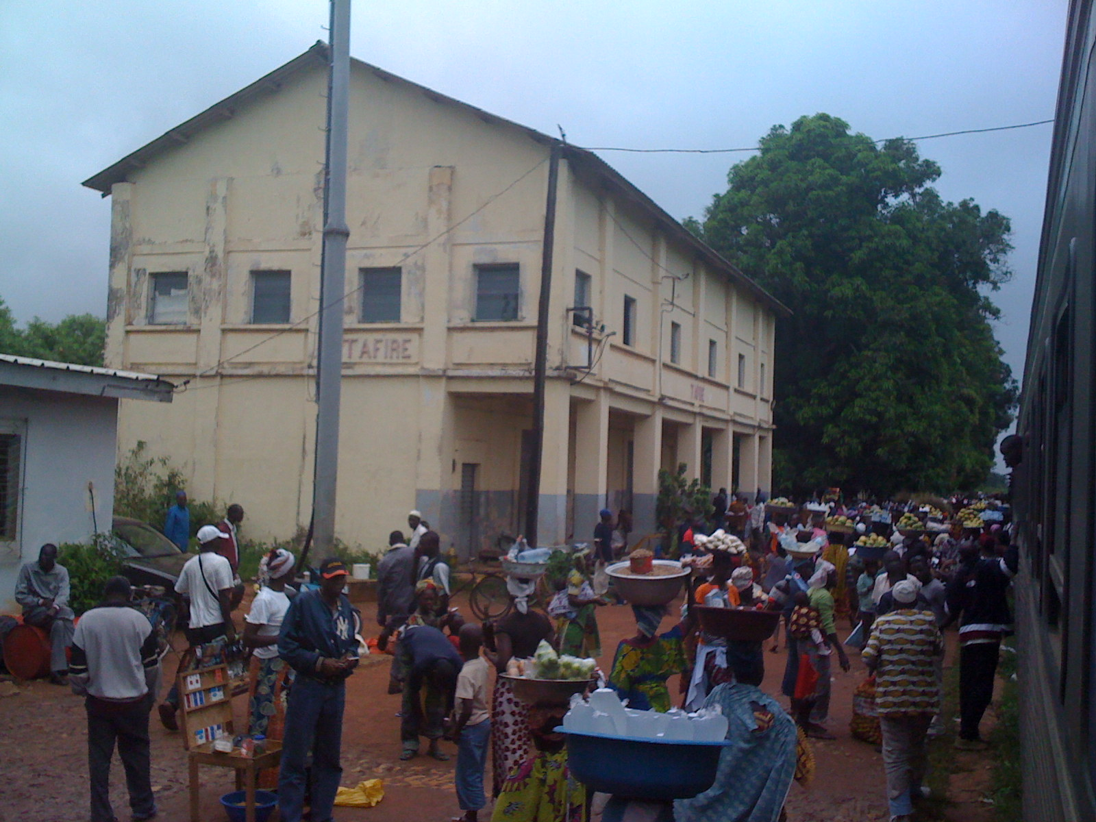 Scène de gare ferroviaire à Tafiré, Côte d'Ivoire